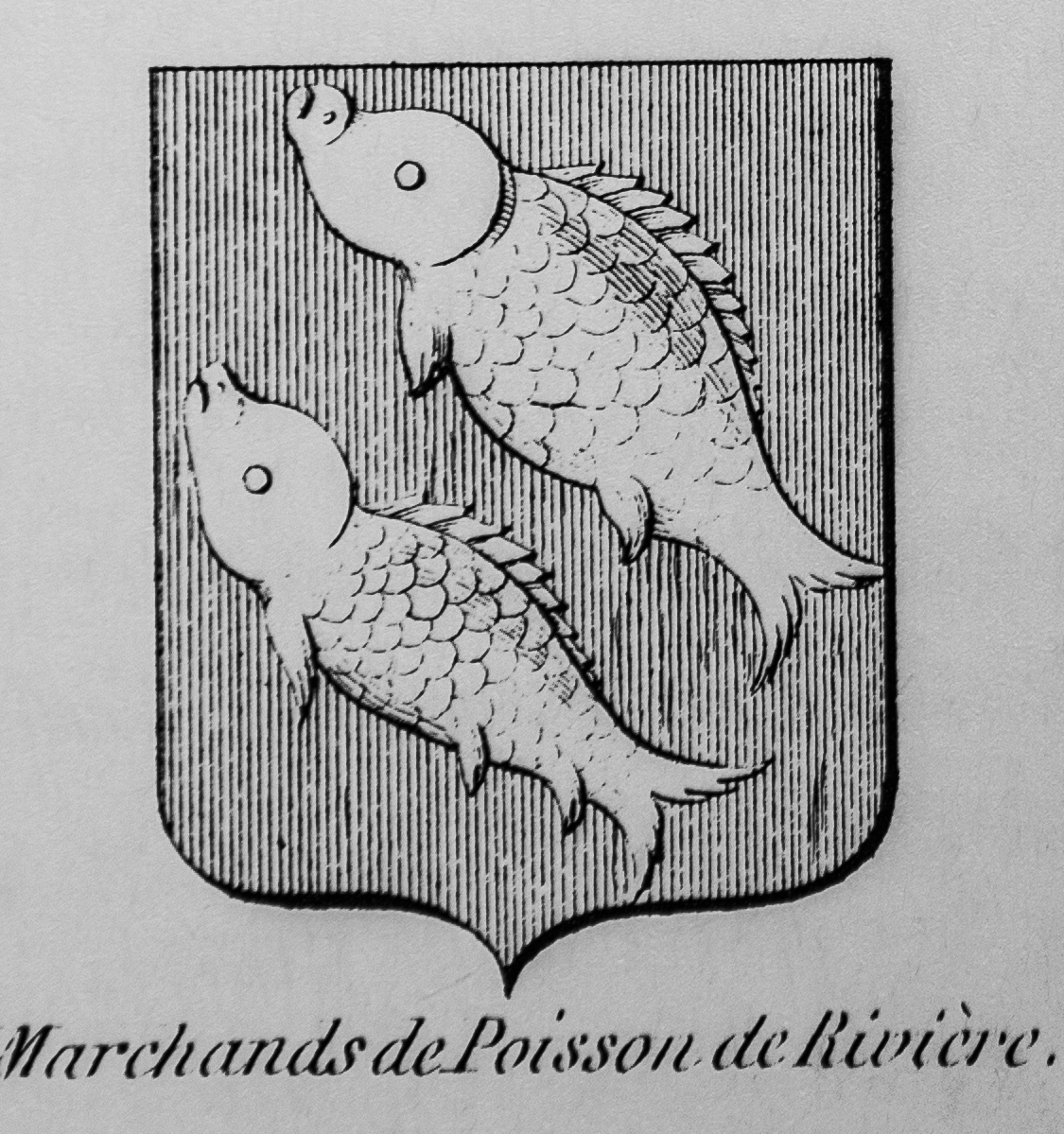 Blason métier marchands de poisson de rivière - Nations de Bruxelles